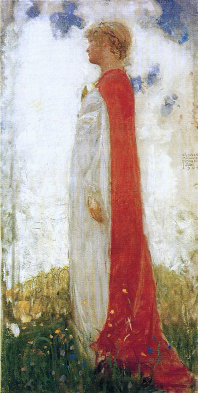 sketch